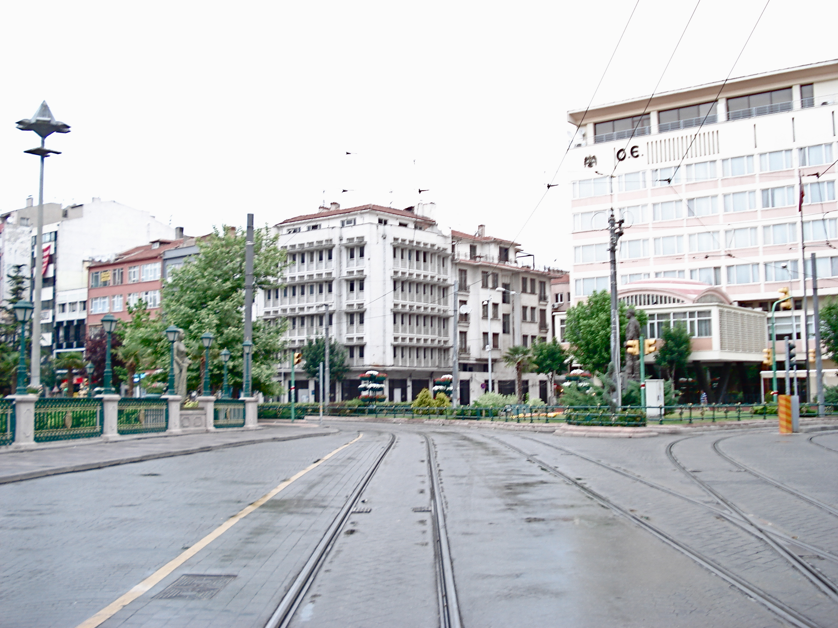 Estram yolu, Eskişehir